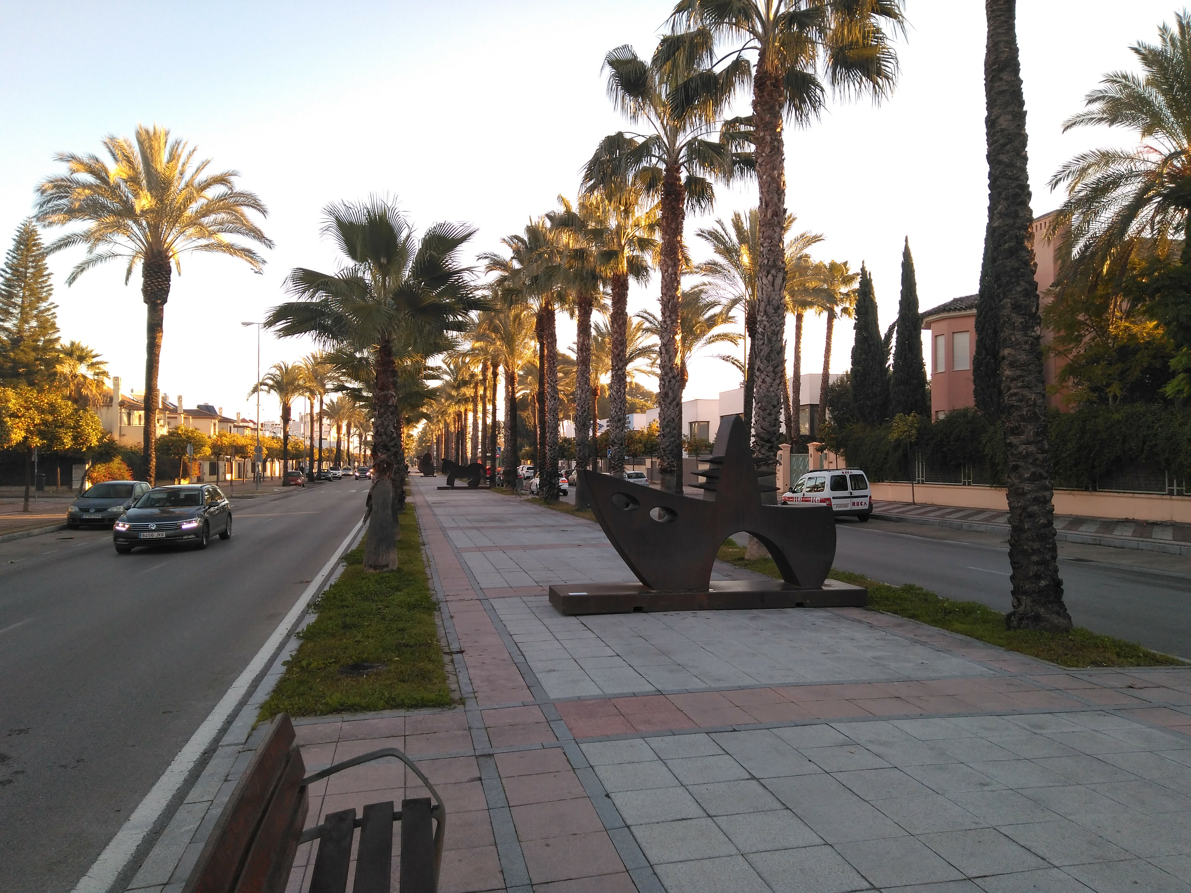 exposición de obras de Juan Méjica García en Jerez de la Frontera